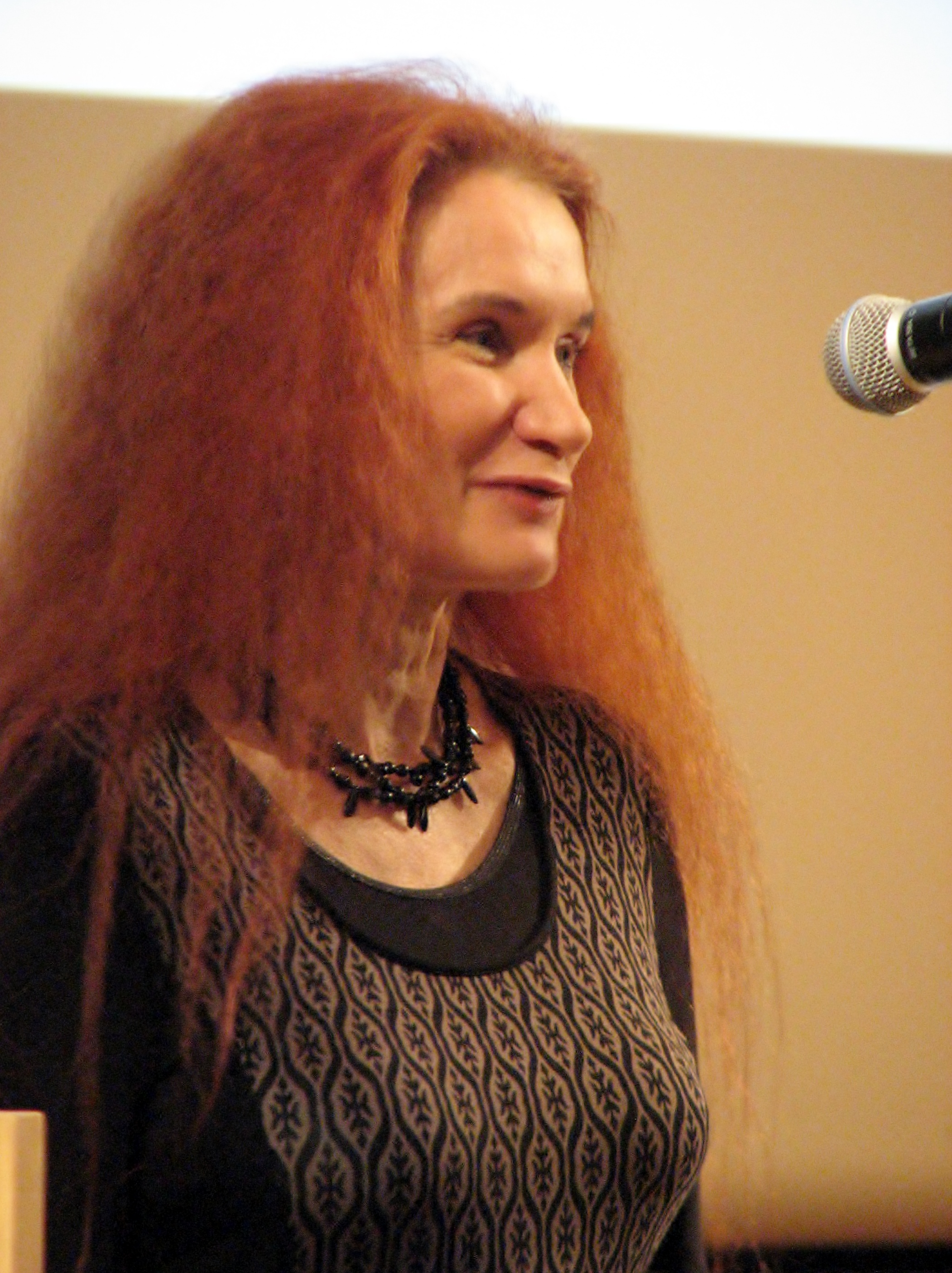 Viive Noor konkursi 25 kauneimat Eesti raamatut ja 5 kauneimat lasteraamatut 2013 autasustamisel